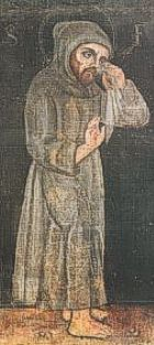 Questo ritratto è conservato nel Santuario di Greccio (Rieti) ove Probabilmente S.Francesco vi transitò probabilmente più di una volta durante i suoi viaggi in Italia. Questo ritratto è decisamente importante pur se poco conosciuto poichè tradizione vuole che sia l'unico ritratto eseguito con San Francesco in vita. Quindi il più somigliante alla reale figura del Santo. Fu fatto eseguire probabilmente da Jacopa dei Settesoli l'anno prima della morte del Santo; essendo l'immagine su tela incollata alla tavola, non può essere considerata l'originale, ma si ritiene sia una copia del '300. L'atteggiamento del Santo non è quello di una persona che piange, ma di una persona che soffre, a causa delle malattia da cui era stato provato negli ultimi anni della sua vita, soprattutto il male agli occhi per cui dovette subire una dolorosa operazione.